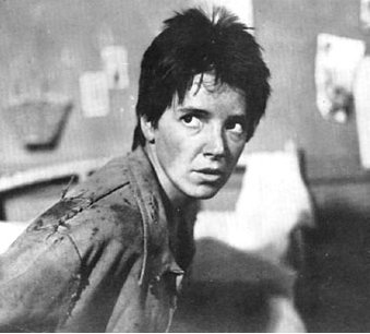 Marilina Ross en la filmación de La Raulito (1975). Argentina